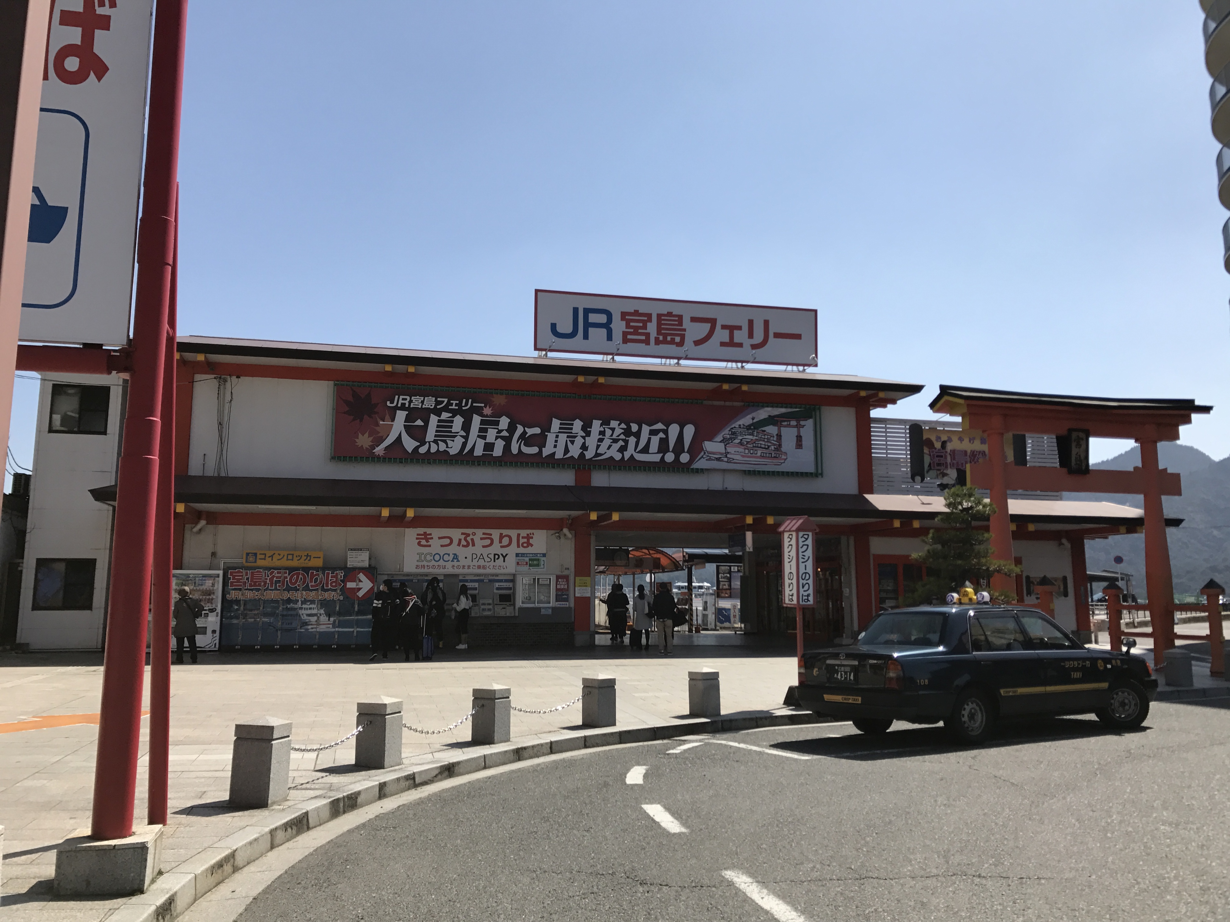 JR西日本宮島フェリーの宮島口駅